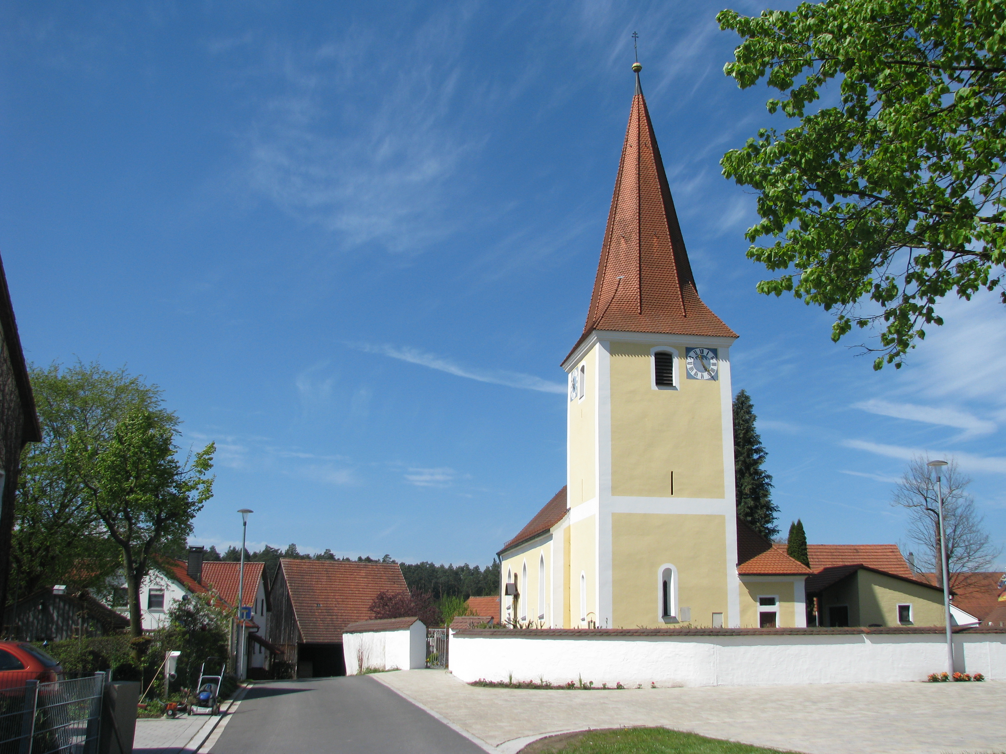 Loderbach, Ortsteil der Gemeinde Berg bei Neumarkt in der Oberpfalz,Filialkirche St. Georg